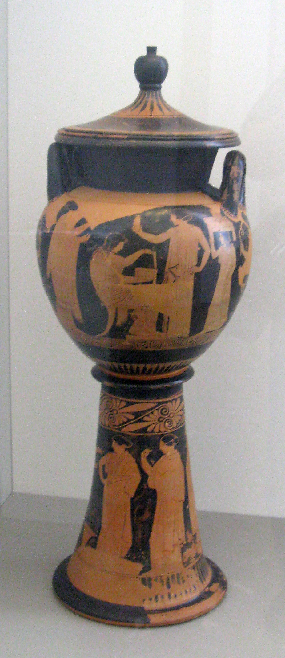 Dem Sabouroff-Maler zugeschriebenes Lebes Gamikos mit der Darstellung der Schmückung einer Braut, um 450 v. Chr., mit einem weiteren Stück aus einem Grab in Athen, Antikensammlung Berlin/Altes Museum